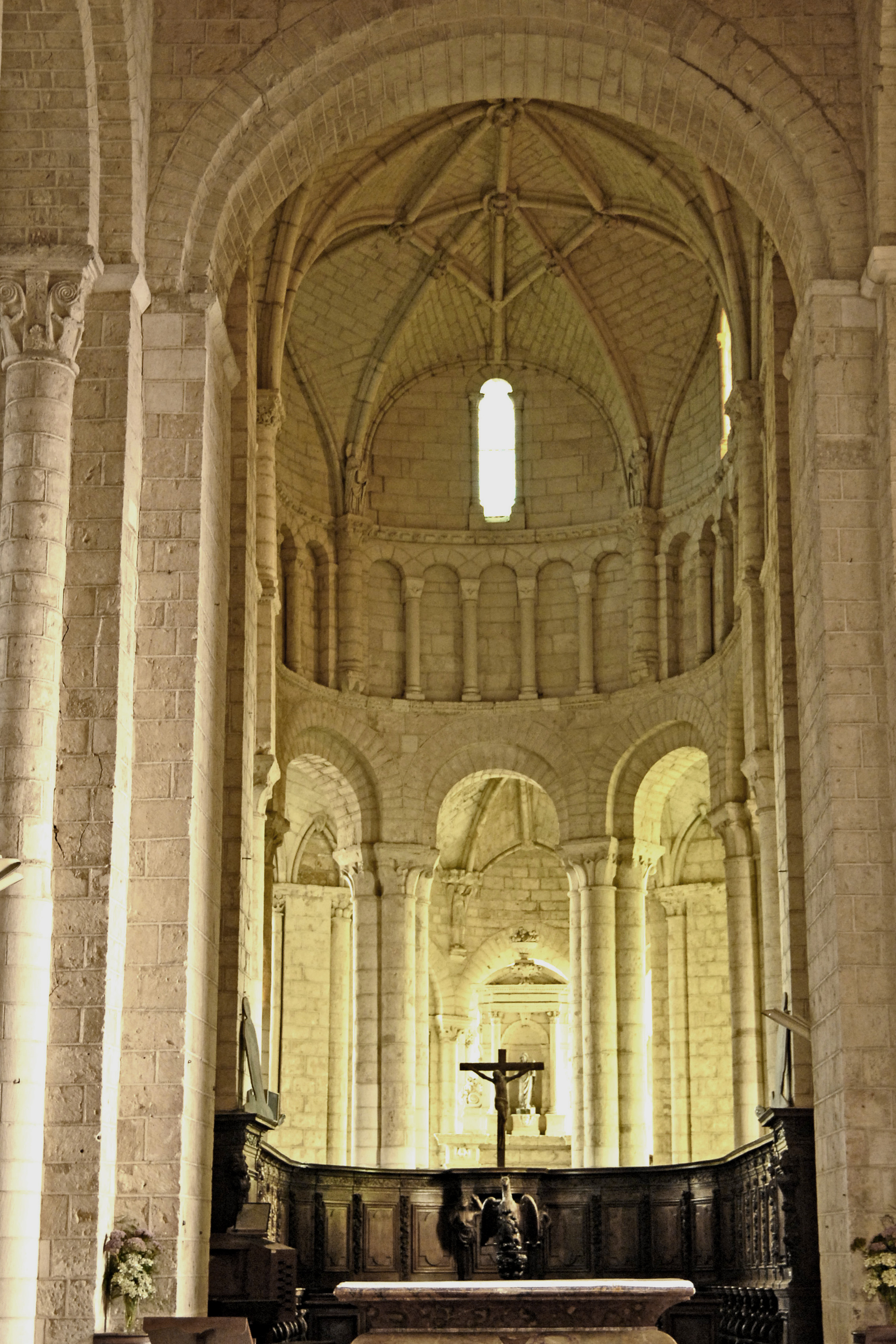 Saint-Jouin-de-Marnes, Umgangschor mit Arkadenzone